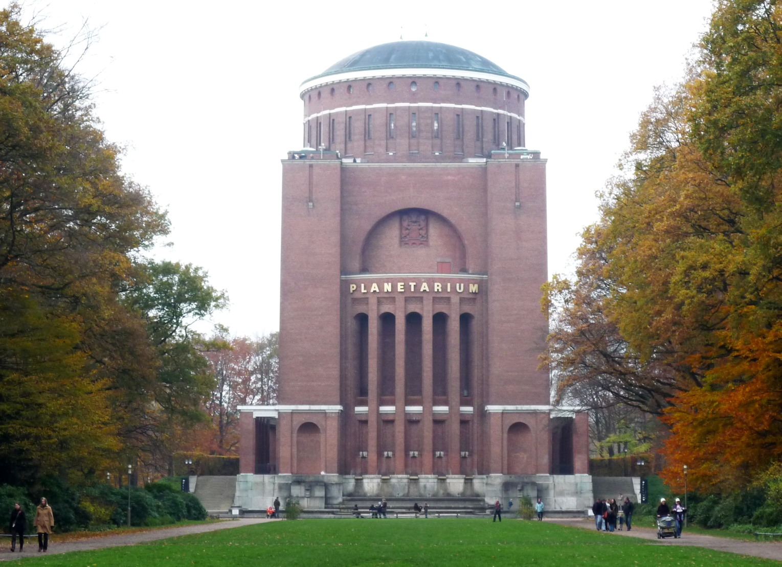 Planetarium im Stadtpark Hamburg